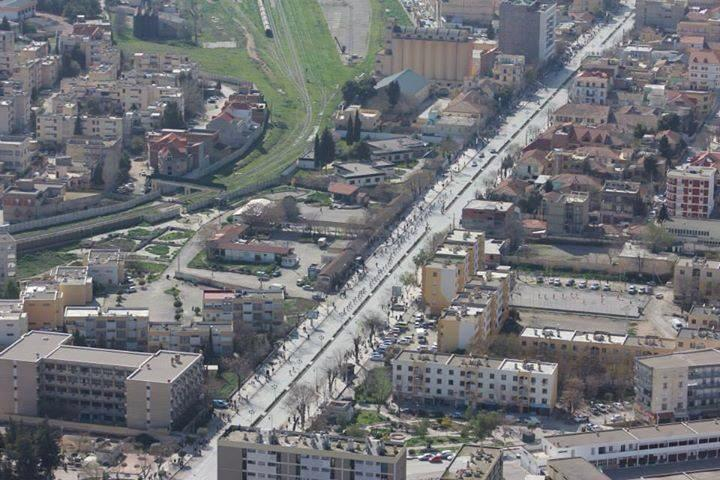 Vue aériene de sétif